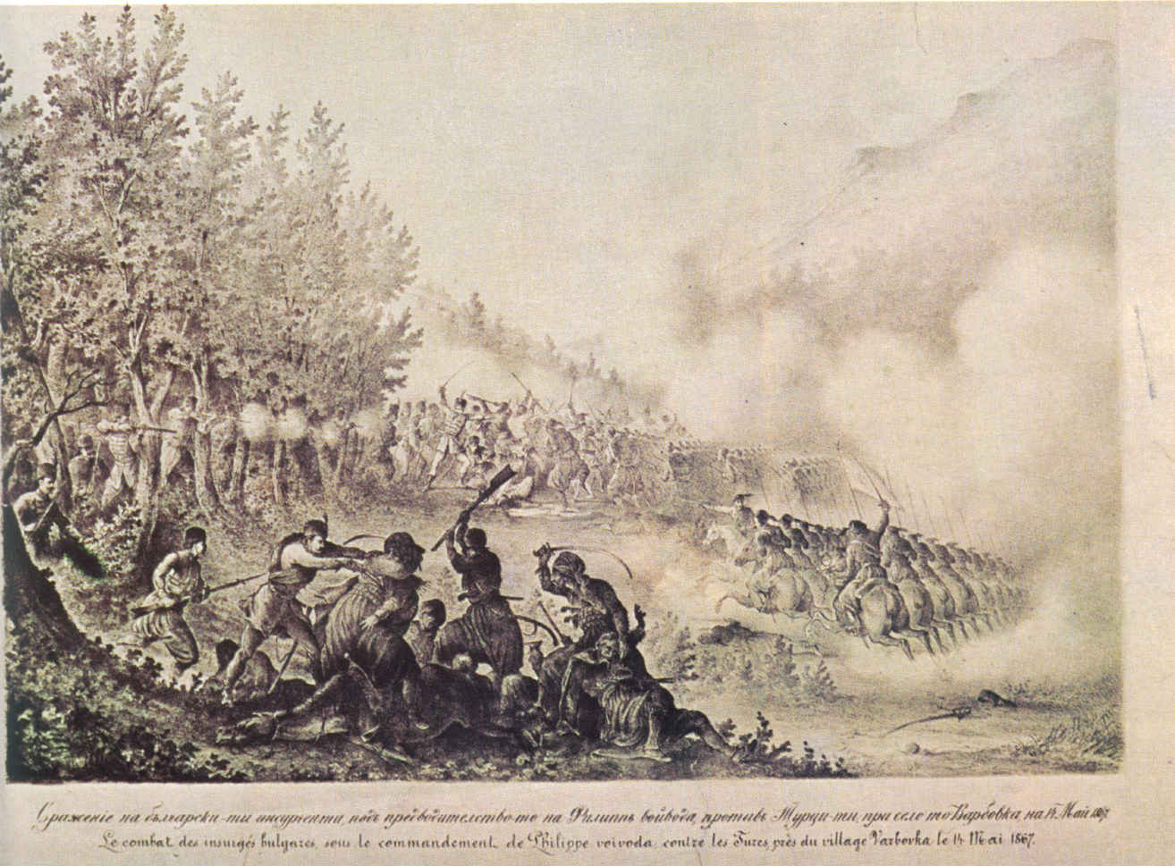 "Боят при Върбовка", литография от полския художник Хенрих Дембицки (1830-1906)